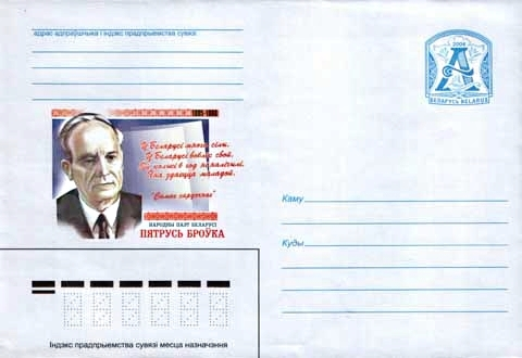 Народный поэт Беларуси. Петрусь Бровка – на бел. языке, портрет и стихотворные строки). З. 6952-06. Худ. М. Плахотнюк . Т. 50000